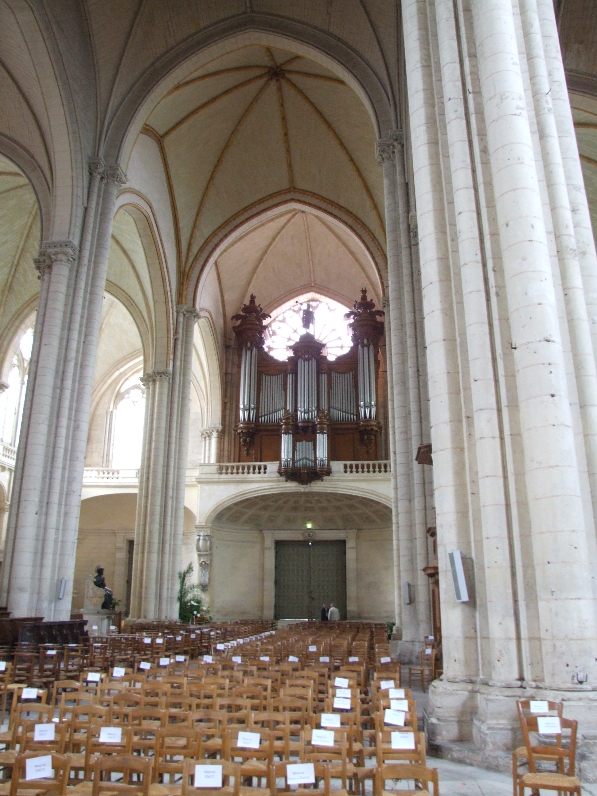 Cathédrale Saint-Pierre de Poitiers, Poitiers, Vienne, Poitou-Charentes, FRANCE